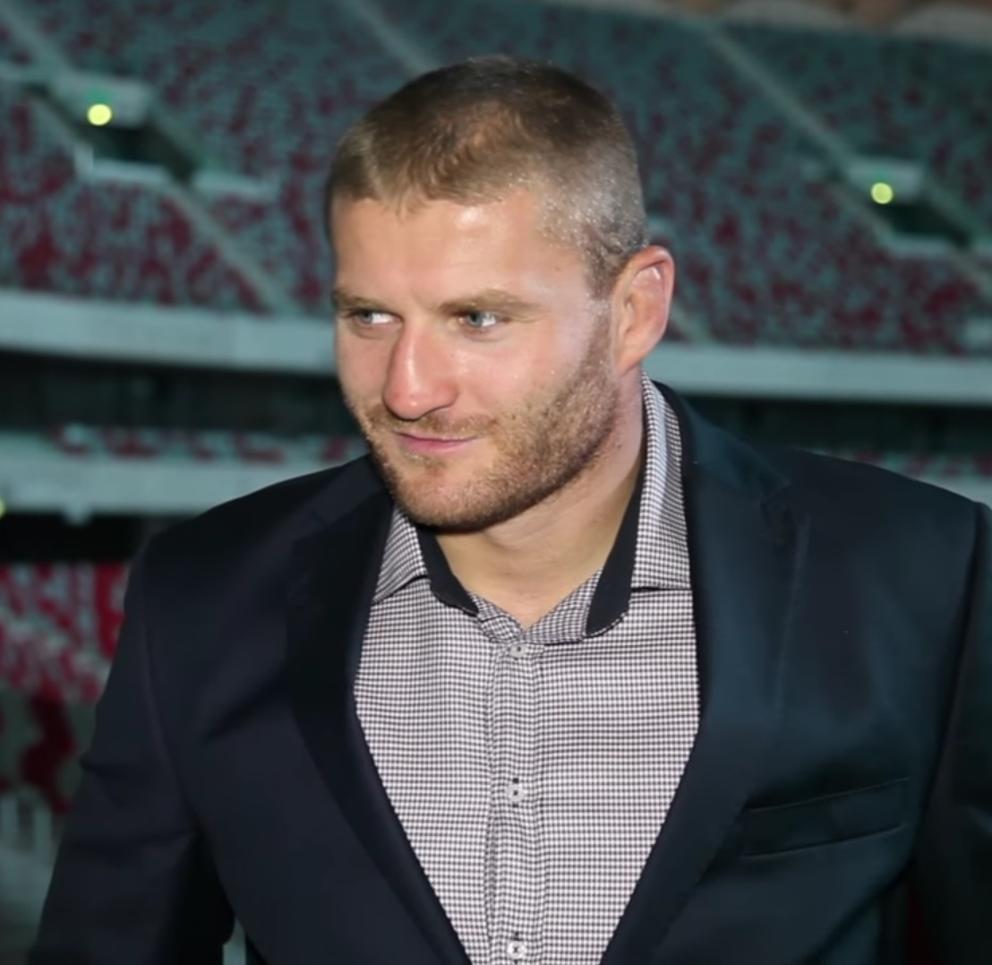 Polski zawodnik MMA Jan Błachowicz